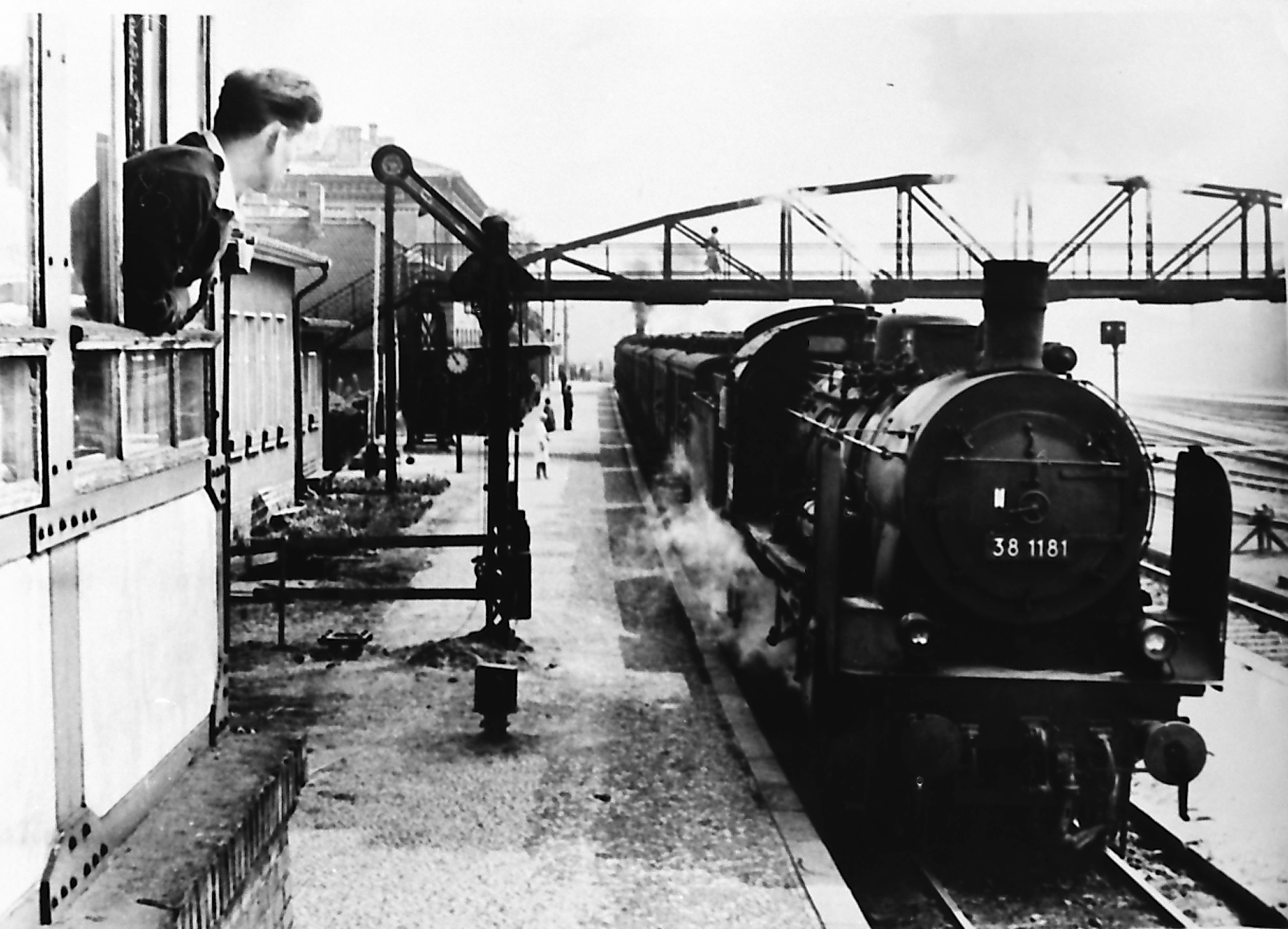 Neben dem Staatsbahnhof befand sich das alte Stellwerk. Baudenkmal